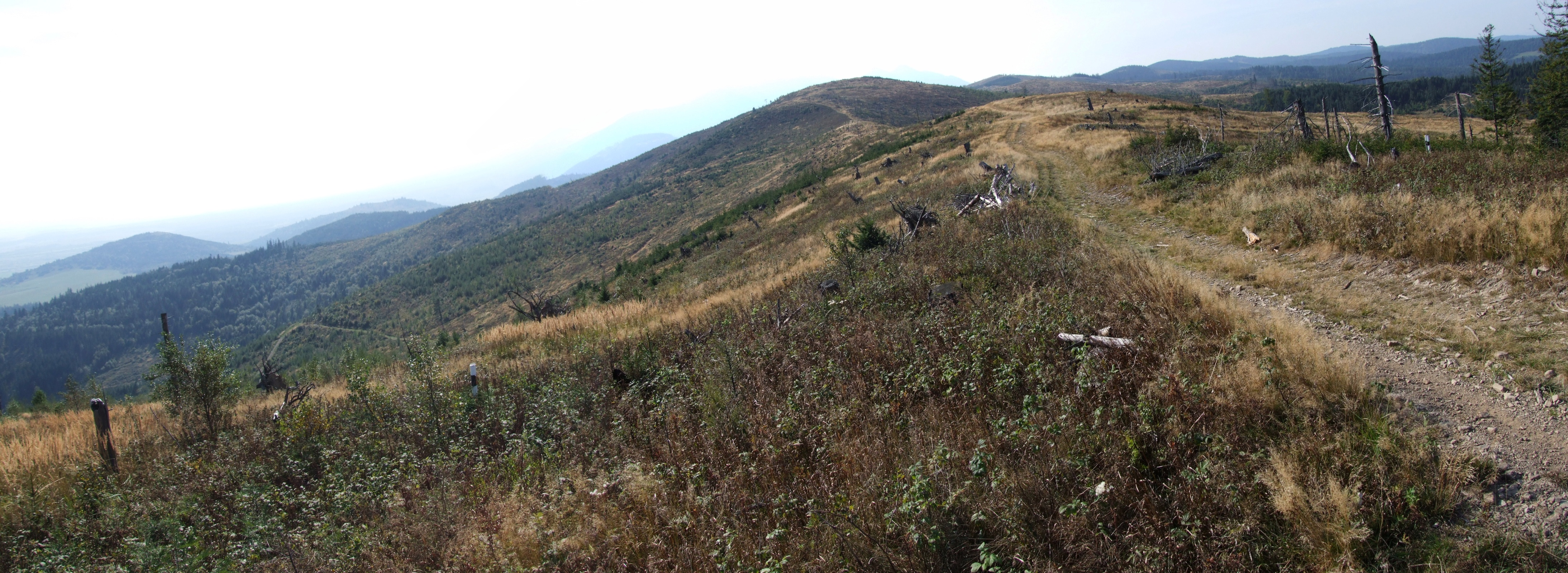 Grzbiet Magury spiskiej między wierzchołkami Spádik i Smreczyny (po wiatrołomach w 2004 r.)